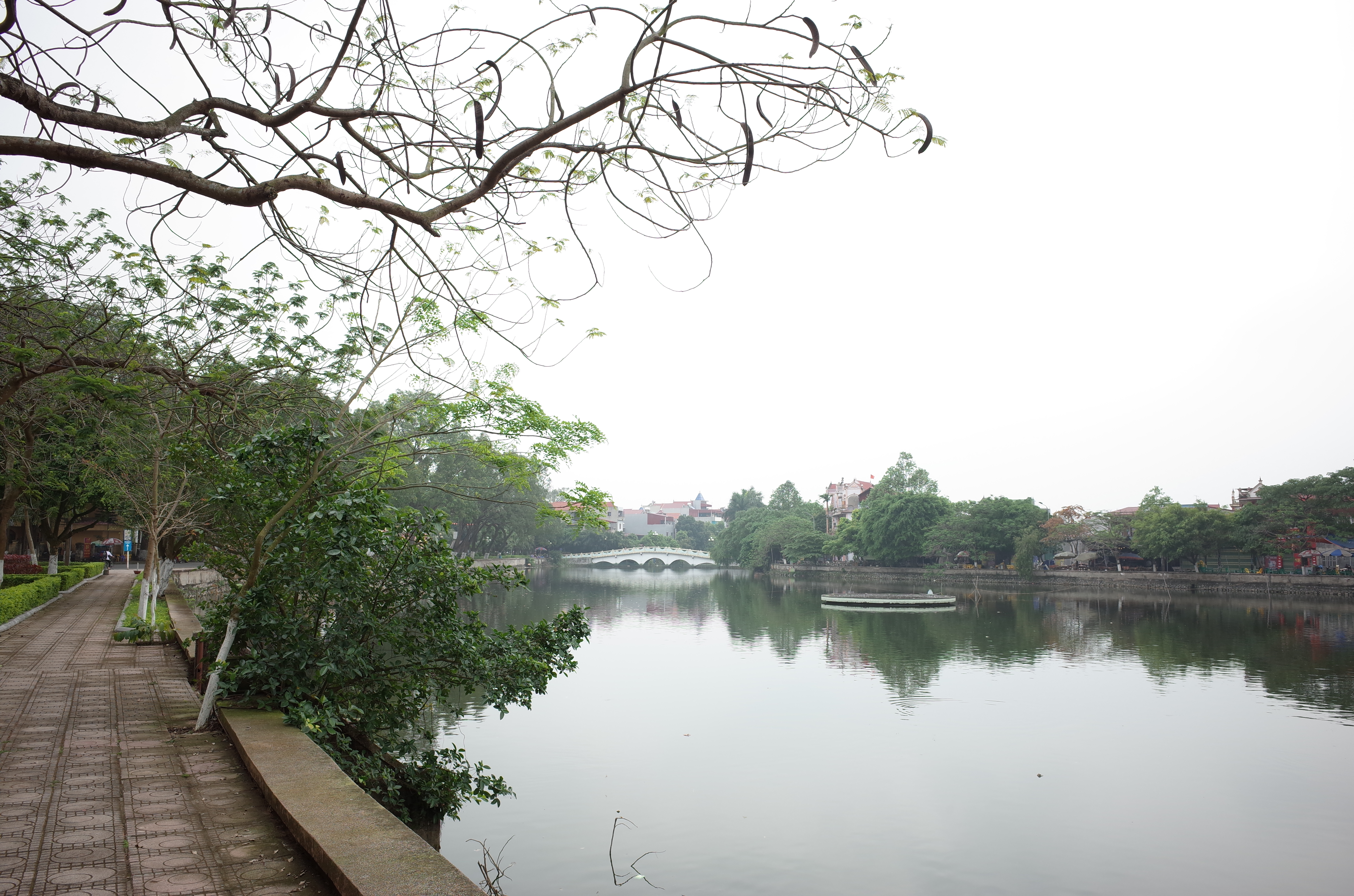 Ảnh chụp bên hồ Thứa, thị trấn Thứa, huyện Lương Tài, tỉnh Bắc Ninh. Ảnh chụp công viên bên hồ phía đường Phá Lãng nhìn về phía đường Hồ Xuân Hương.